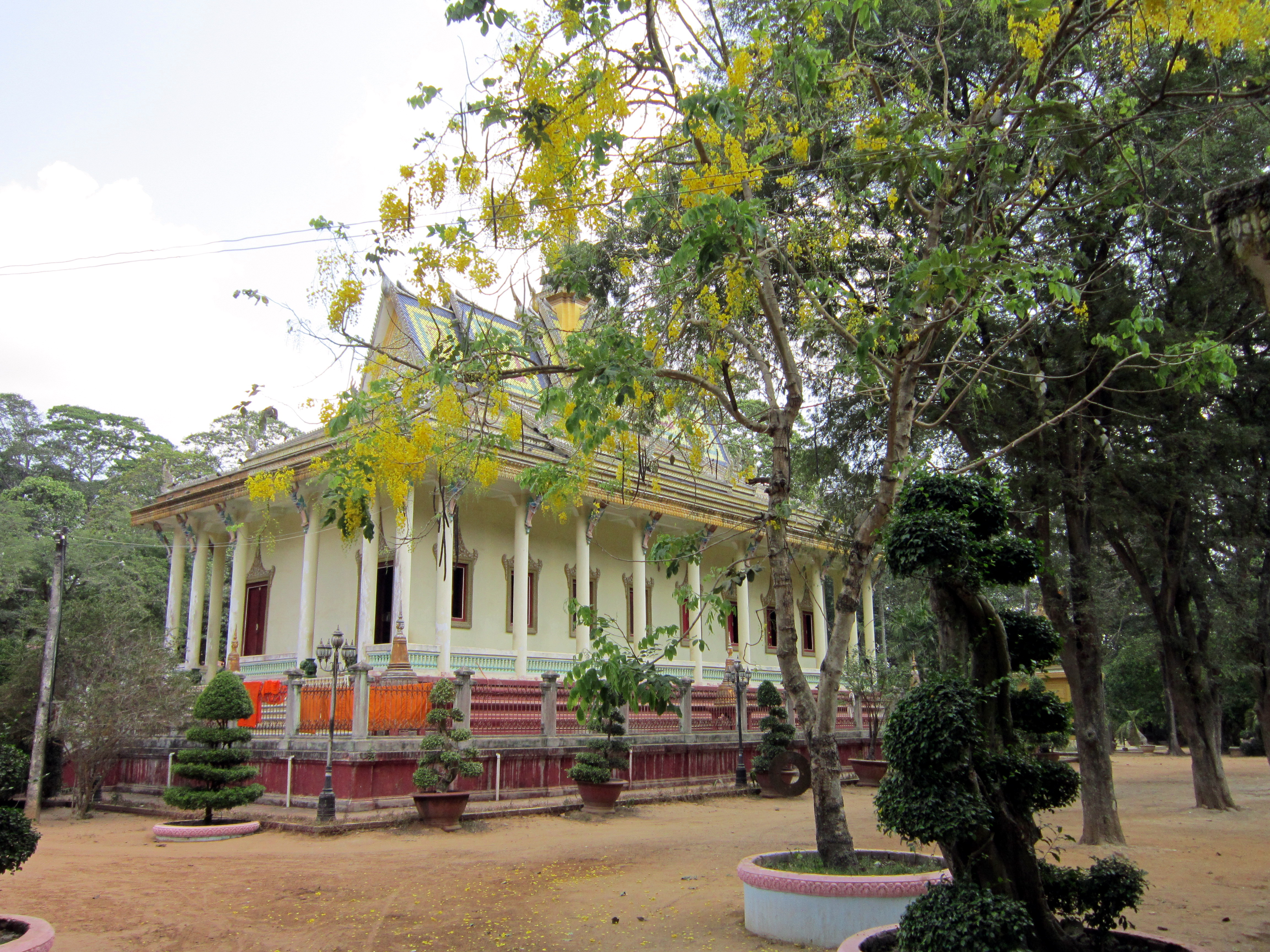 Chùa Kompông Chrây (thường gọi là chùa Hang vì cổng chính vào chùa được thiết kế như cái hang động) là ngôi chùa Phật giáo Nam tông của người Khmer, tọa lạc tại thị trấn Châu Thành (Trà Vinh, Việt Nam).